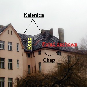 Elementy połaci dachowej